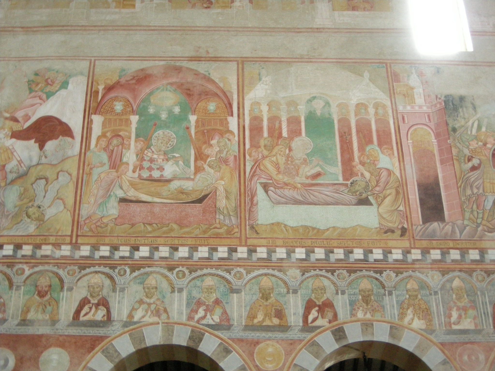 Basilica di san piero a grado, storie di san pietro, san paolo, costantino e papa silvestro